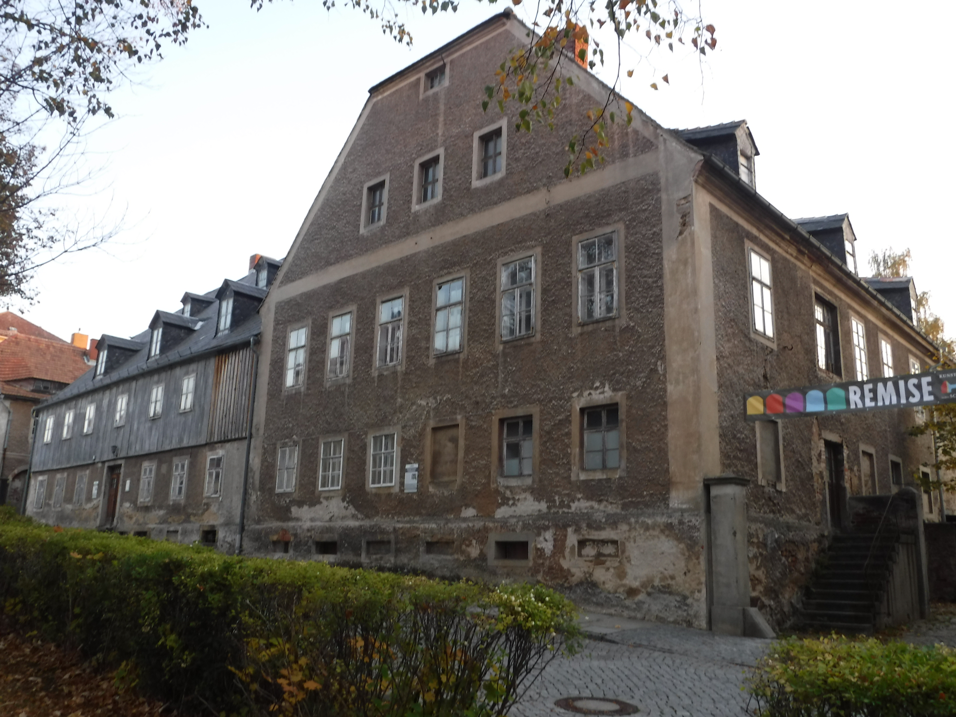 Zinzendorfplatz 7: Wohnhaus mit Chorsaal und anschließendes Wohnhaus mit Hofflügel sowie Brunnen auf dem Hof / Schwesternhaus 1770 eingeweiht Einzeldenkmal der Sachgesamtheit Kolonie Kleinwelka; baugeschichtlich, ortsgeschichtlich, platzbildprägend und religionsgeschichtlich von Bedeutung. Im Inneren miteinander verbunden Linke Hälfte: Obergeschoss Fachwerk, verbrettert, traufständig, mit rückseitigem Flügel Rechtes giebelständiges Wohnhaus: mächtiger zweigeschossiger Massivbau mit Putzgliederung und Krüppelwalmdach, Dachhäuschen, Chorsaal im Dachgeschoss